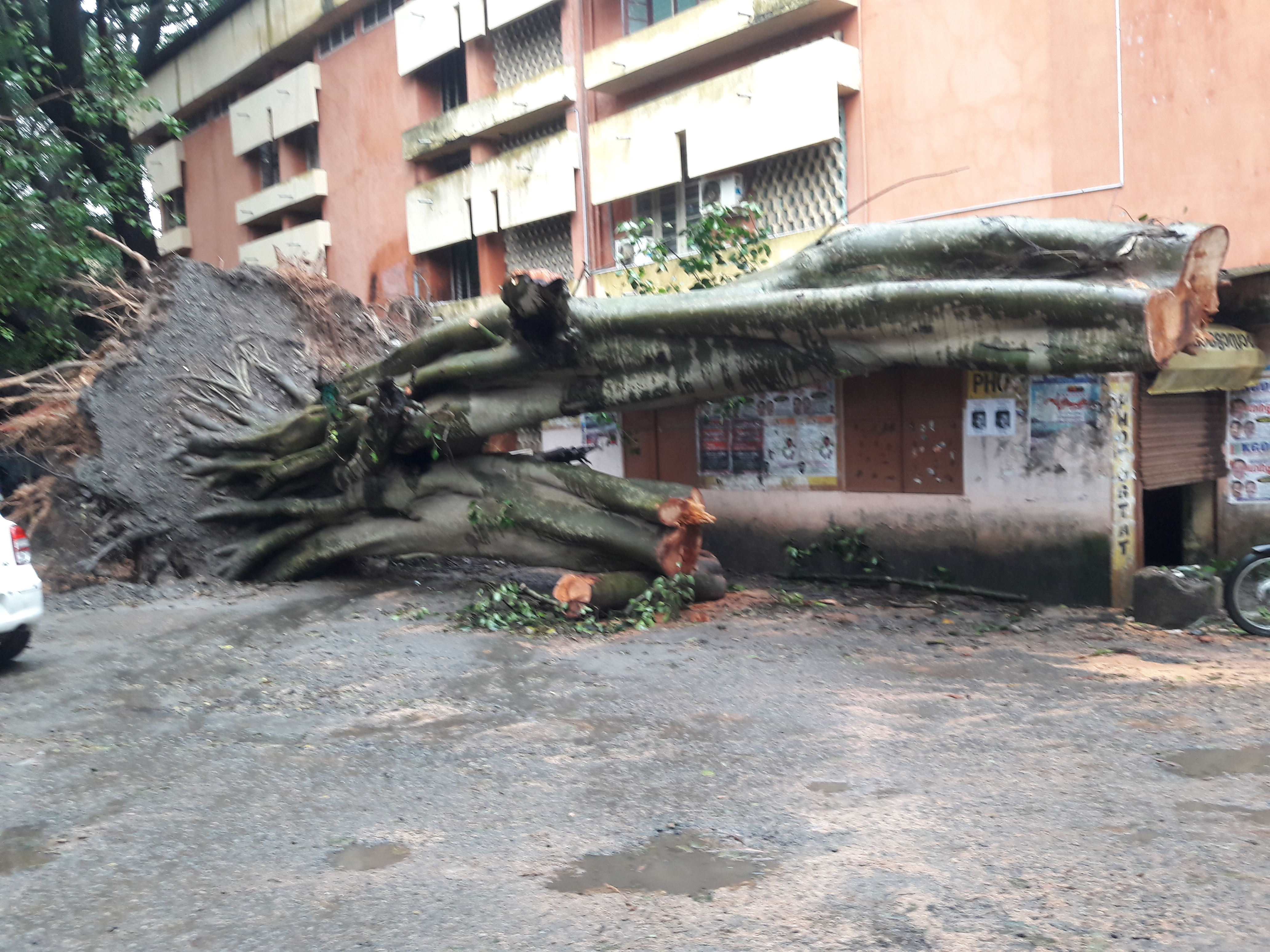 പാലക്കാട് കോടതി സമുച്ചയത്തില്‍ കാറ്റിലും മഴയത്തും കടപറഞ്ഞു വീണ ഒരു കൊയലി മരം / ചേല മരം.Indian bat tree / Indian bat fig.ശാസ്ത്രീയ നാമംFicus amplissima കുടുംബം Moraceae.